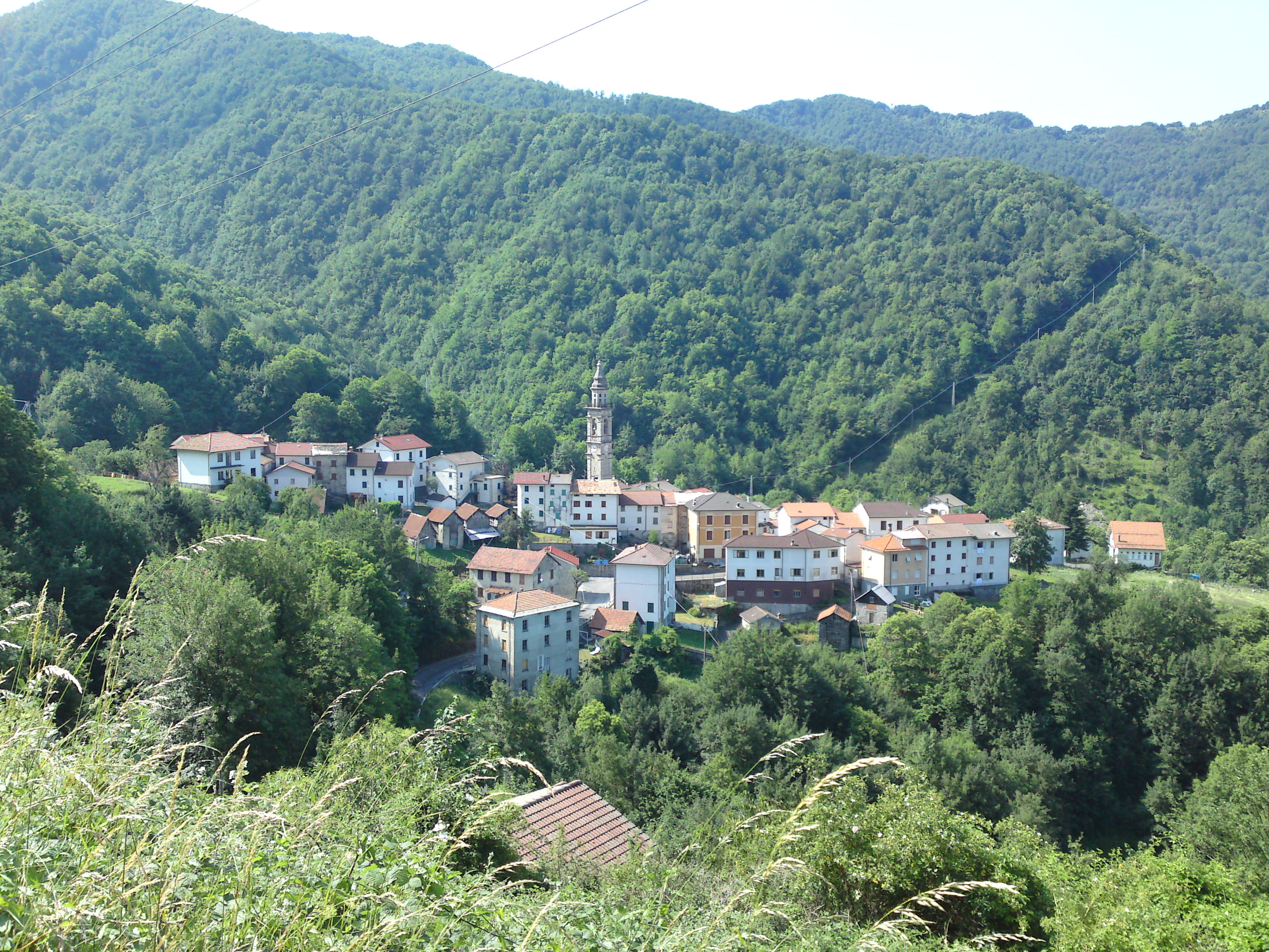 Panorama dalla strada del valico di Fregarolo